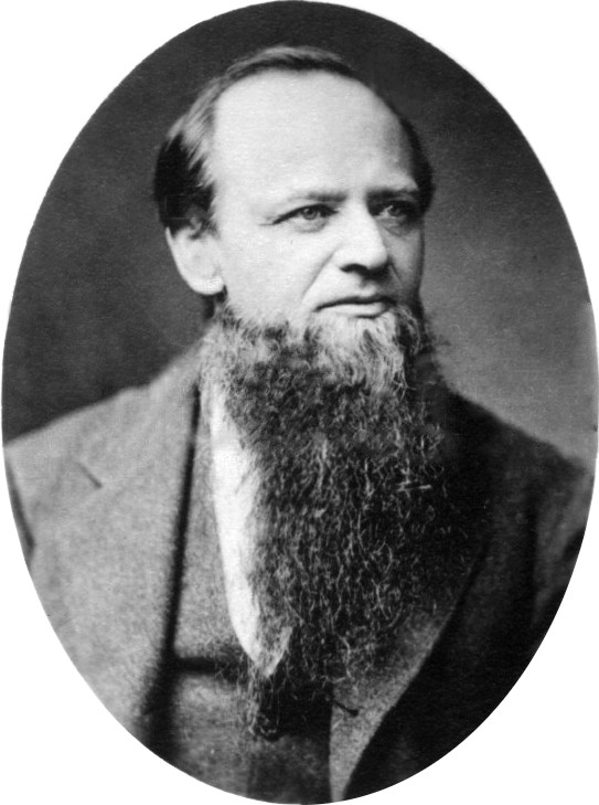 Samuel Archer King